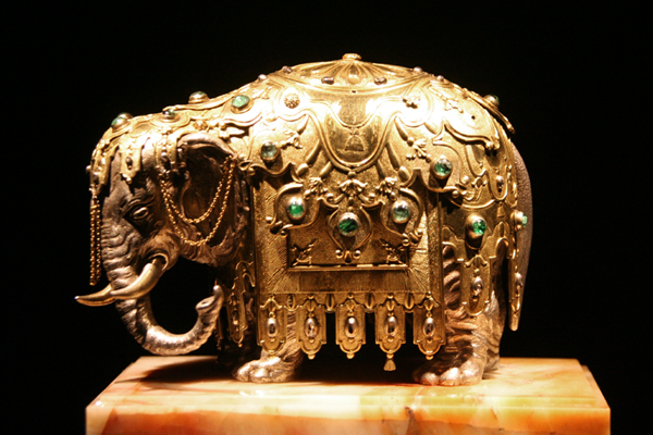 Gotha, Schloss Friedenstein, Ständige Sammlung, Elefant aus Gold, Silber, Smaragd (1725)